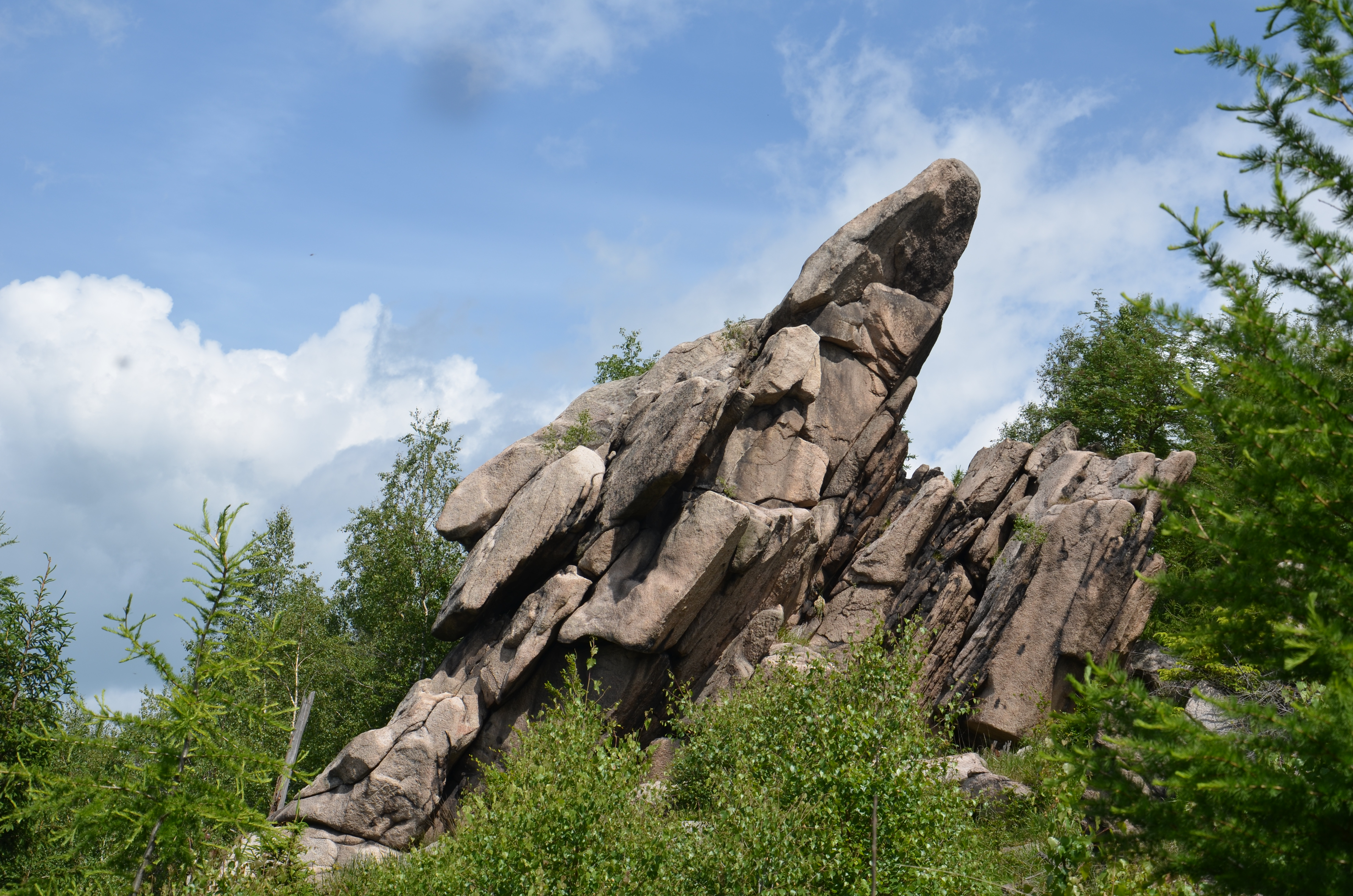 Strużnickie wyrzutnie rakietowe